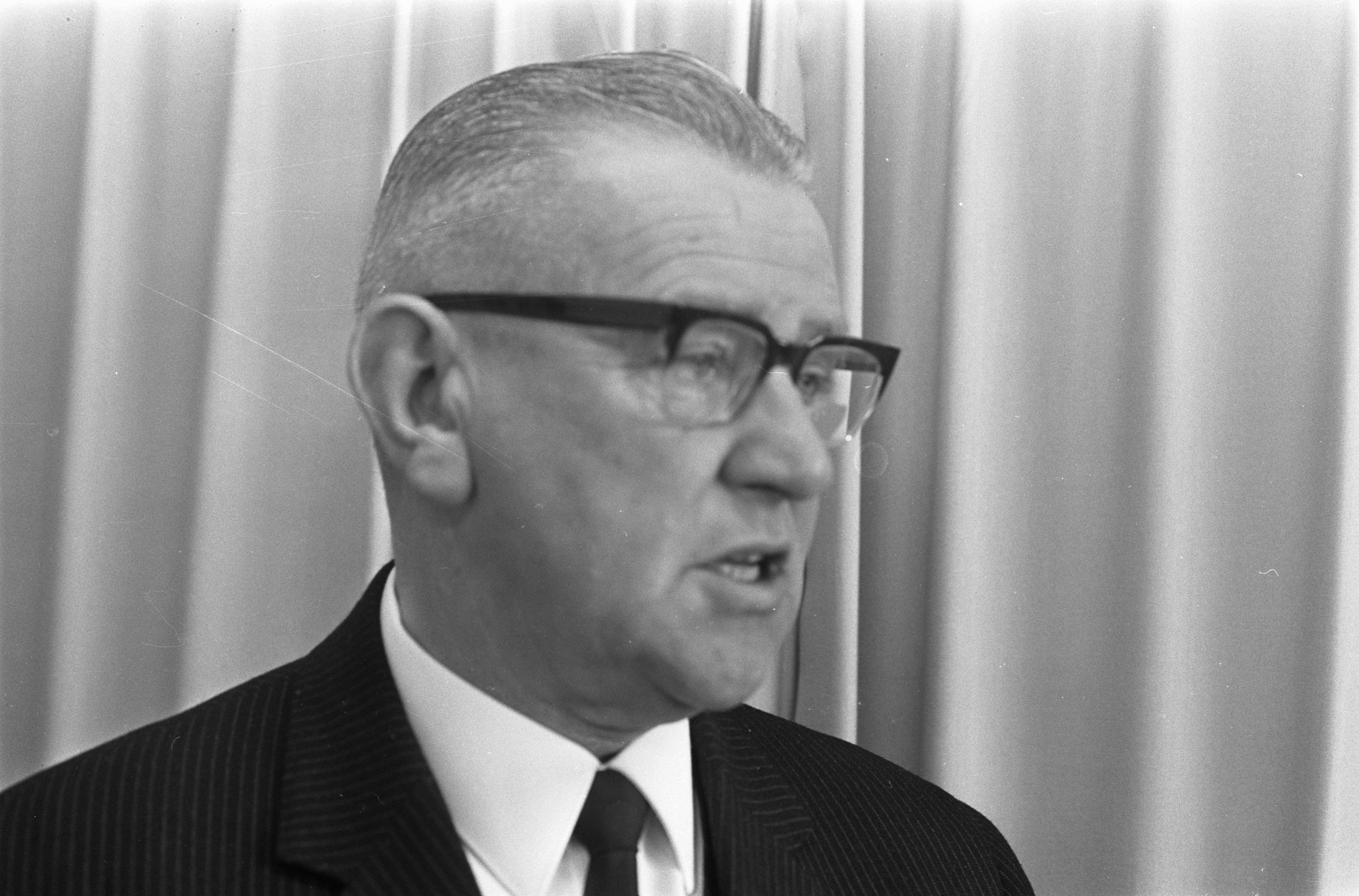 Ned. Scheepsbouwkundig Proefstation te Wageningen geeft persconferentie prof.dr.ir. W.P.A. van Lammeren (voorzitter Directie)